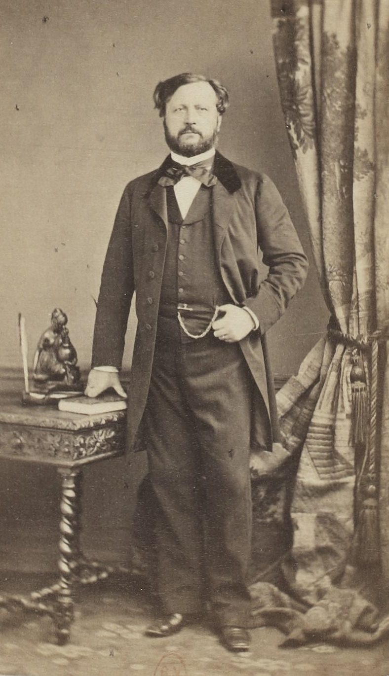 Album des députés au Corps législatif entre 1852-1857.